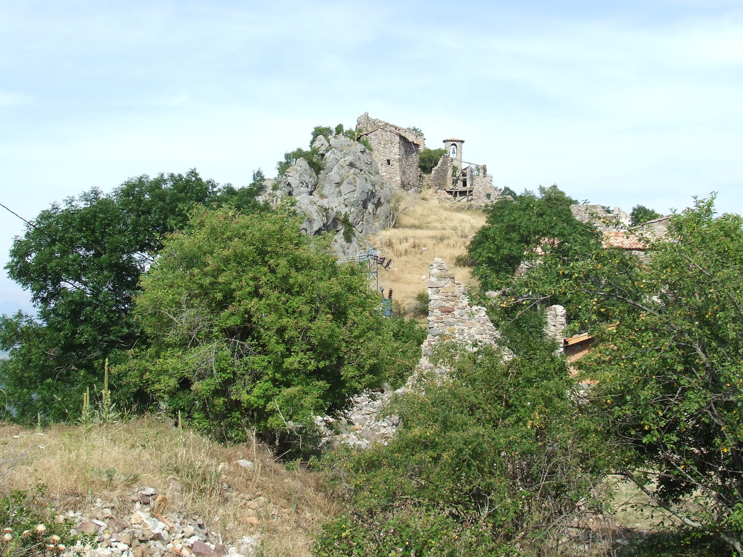 El poble de Cérvoles des de ponent (Senterada, Pallars Jussà)